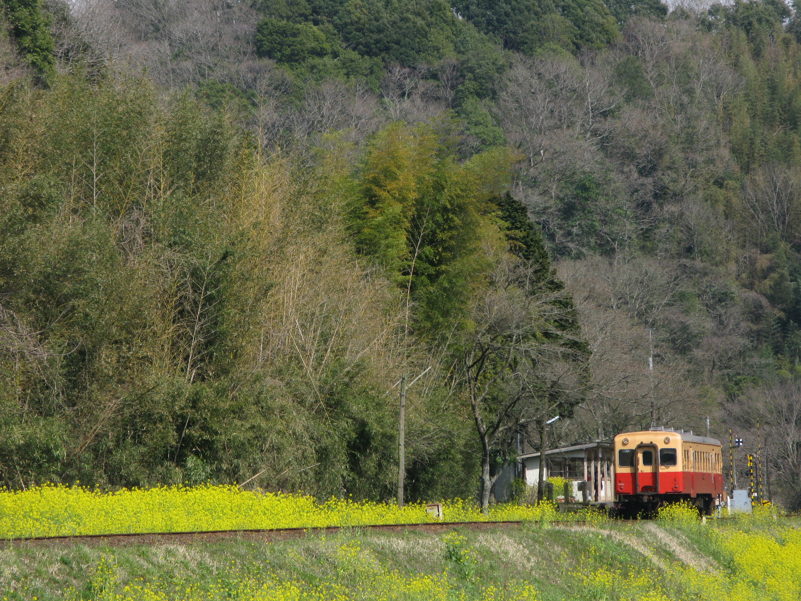 入線中の上り列車。